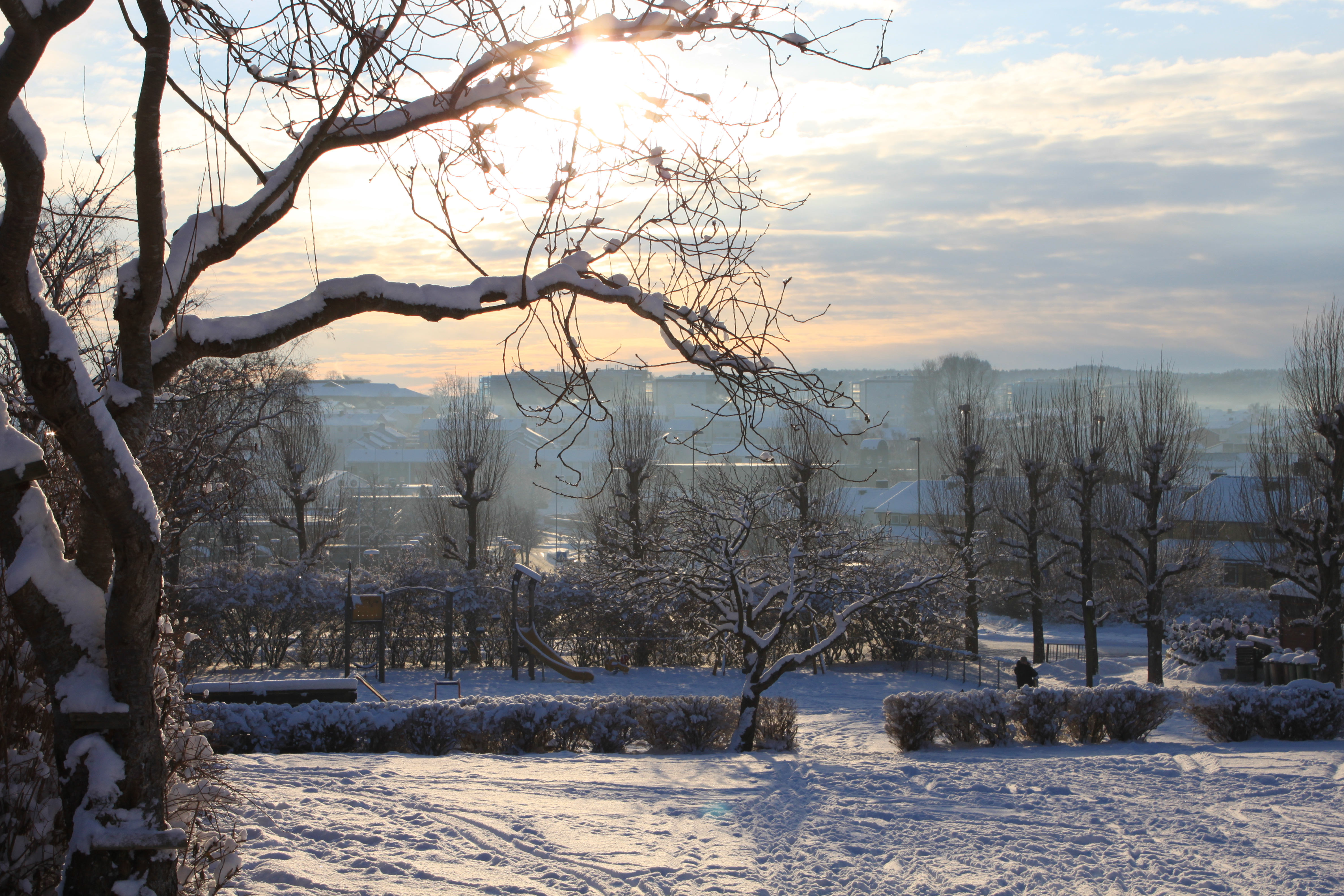 Vinter i Bekkefaret